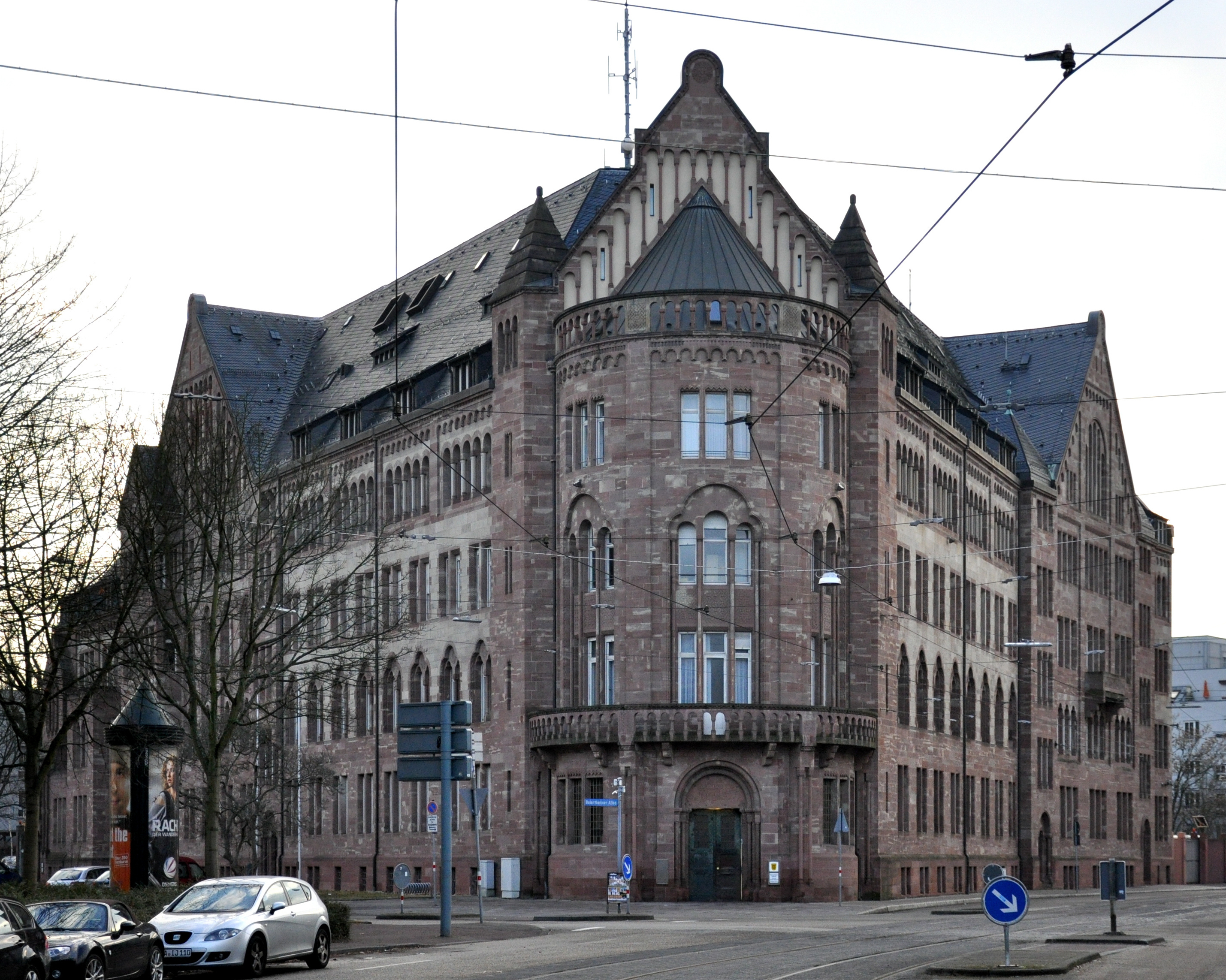 Karlsruhe, Polizeipräsidium Karlsruhe in der Südweststadt (Beiertheimer Allee / Mathystraße)